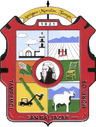 Escudo del Villa de Antiguo Morelos, Tamaulipas, México